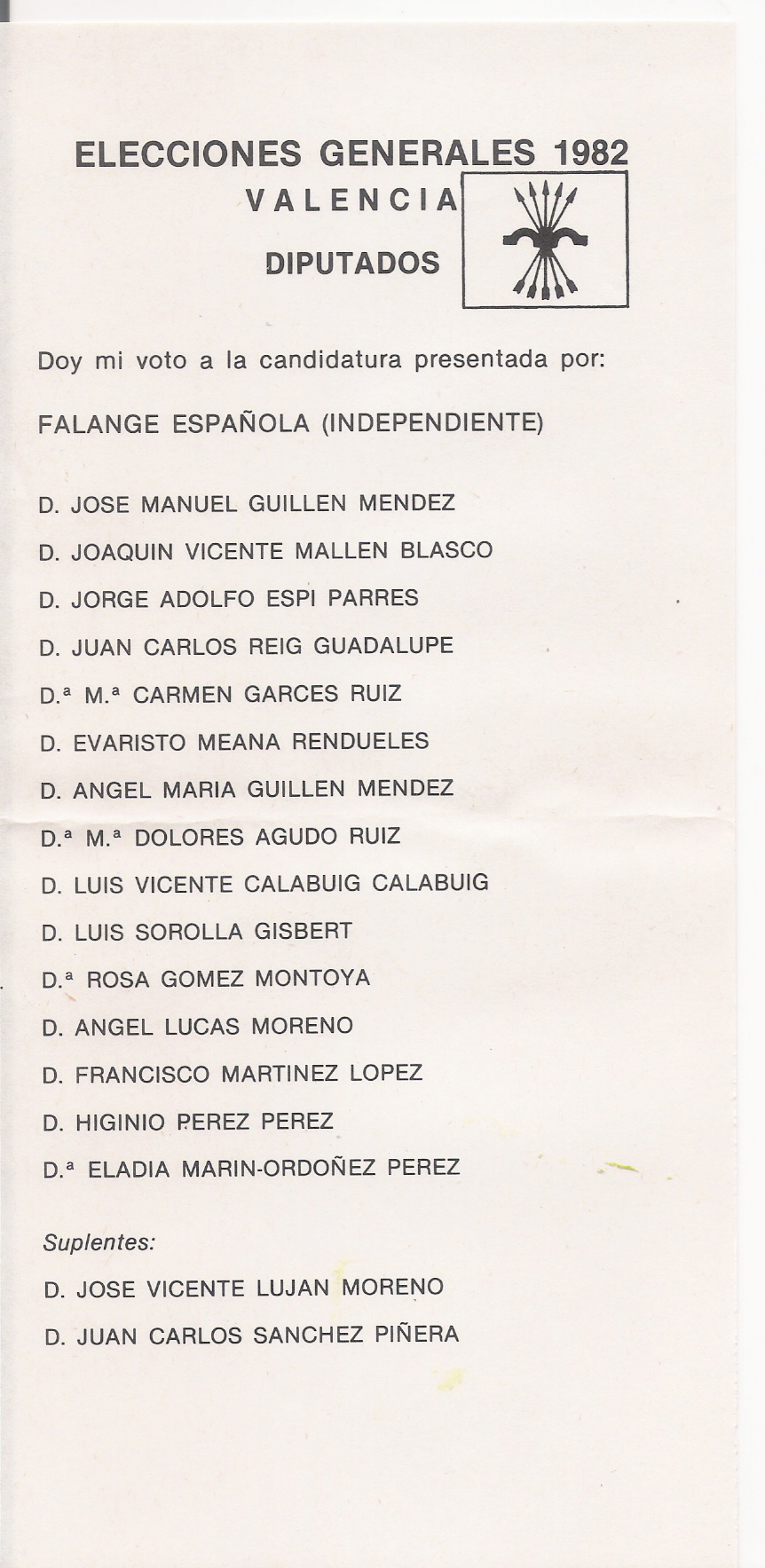 Papeleta electoral de Falange Española (independiente) al Congreso por Valencia en 1982.